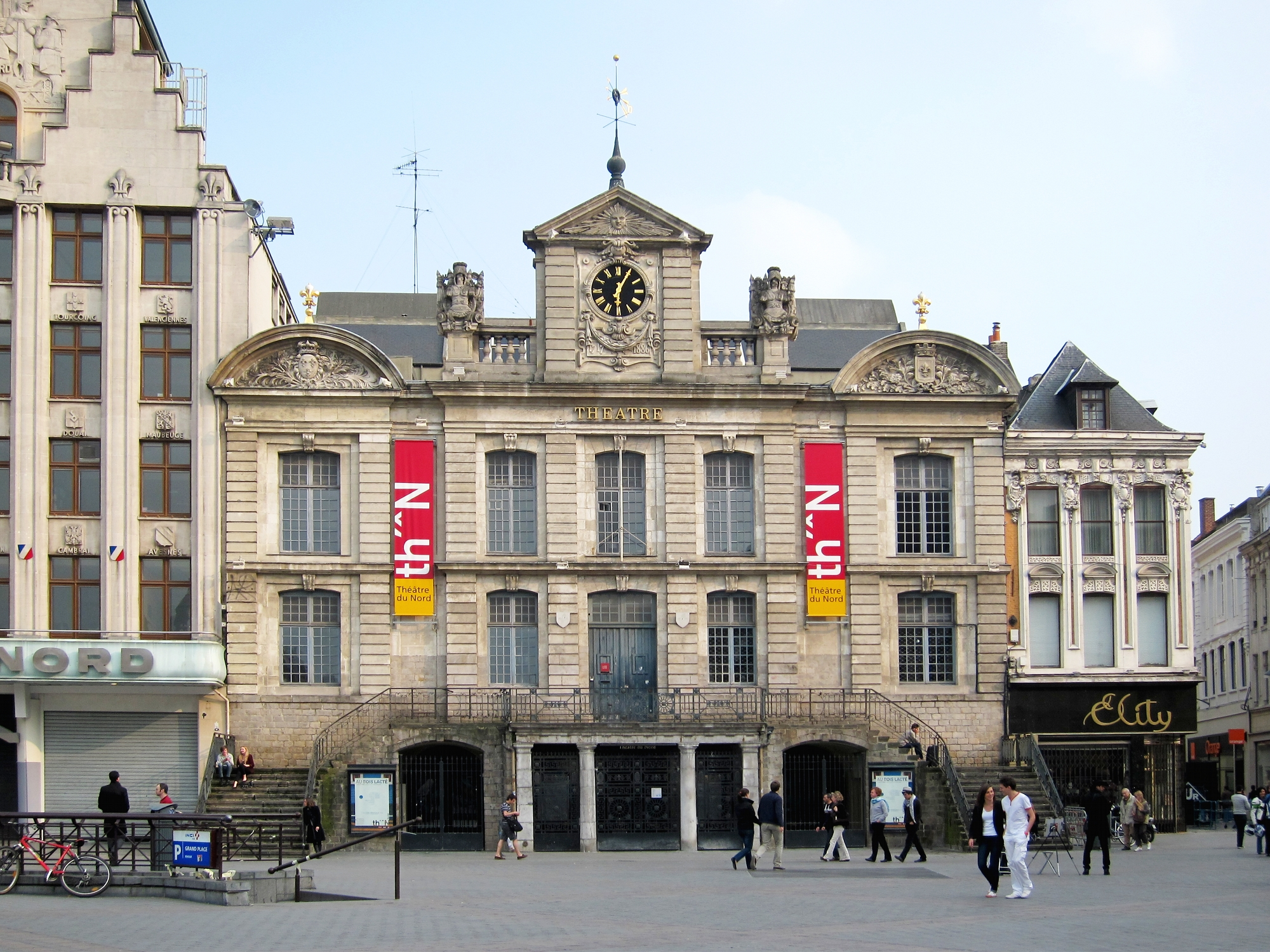 Le théâtre du Nord dans le bâtiment de la Grand Garde à Lille (Nord).